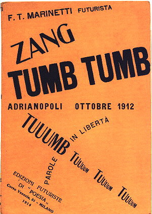 זאנג טומב טומב (1914) מאת פיליפו תומאזו מארינטי